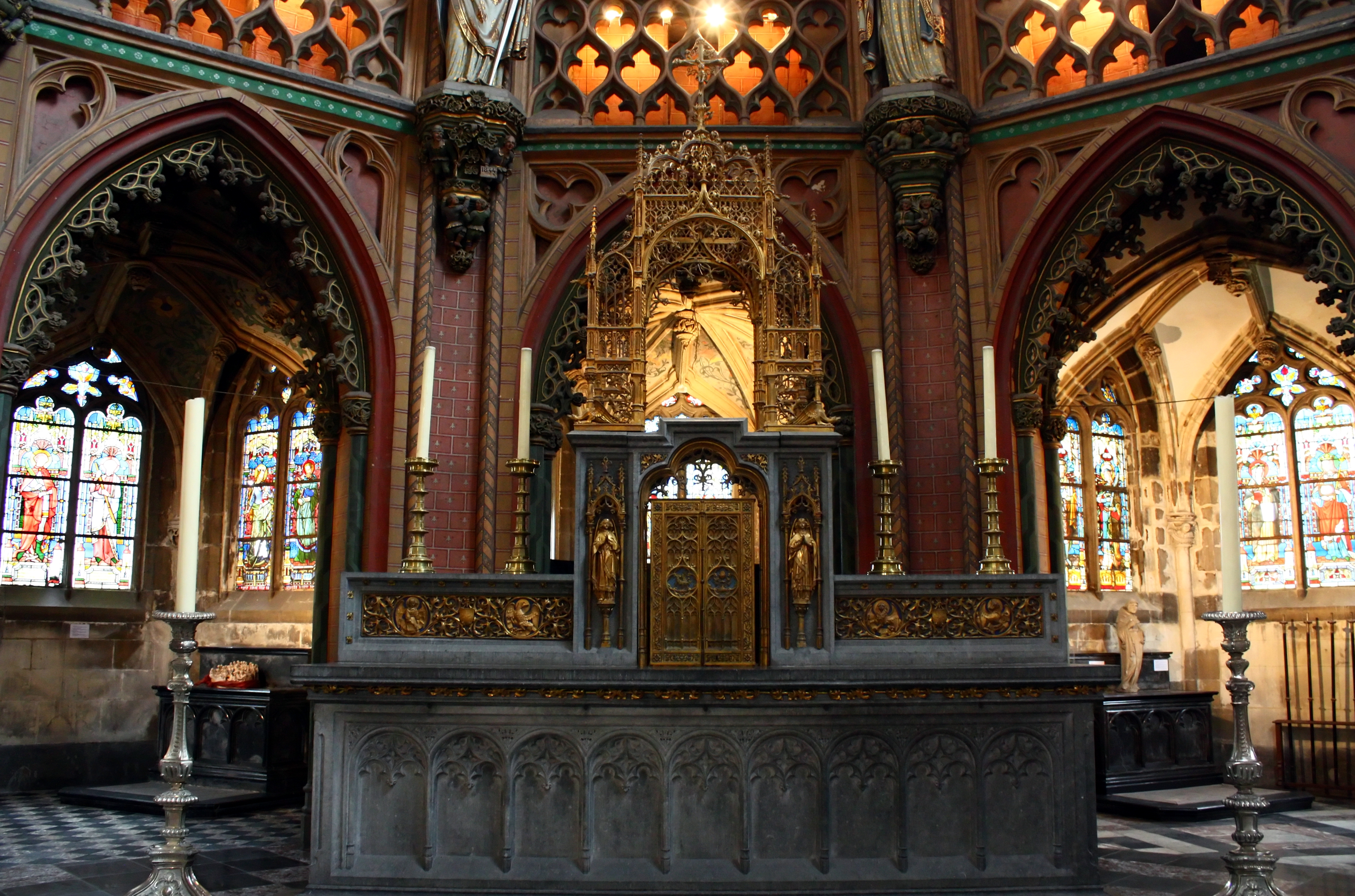 Autel de l'Église Saint-Jacques-le-Mineur.